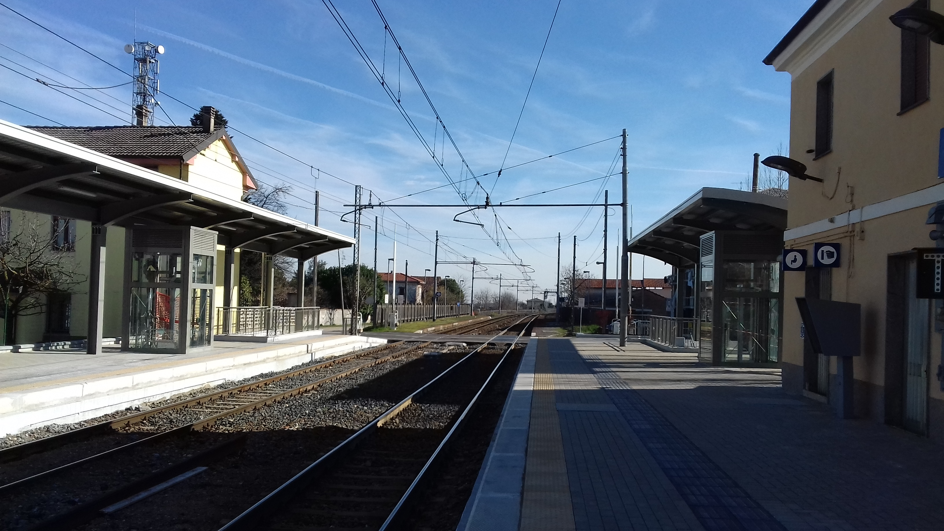 Stazione di Momo, lato binari, lato Novara